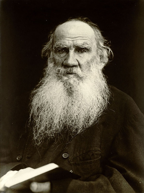 L. N. Tolstoi, scriitor rus.